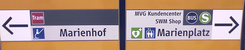 Cartel en el metro de Munich indicando la localización del desfibrilador más cercano (el corazón verde atravesado por el rayo)